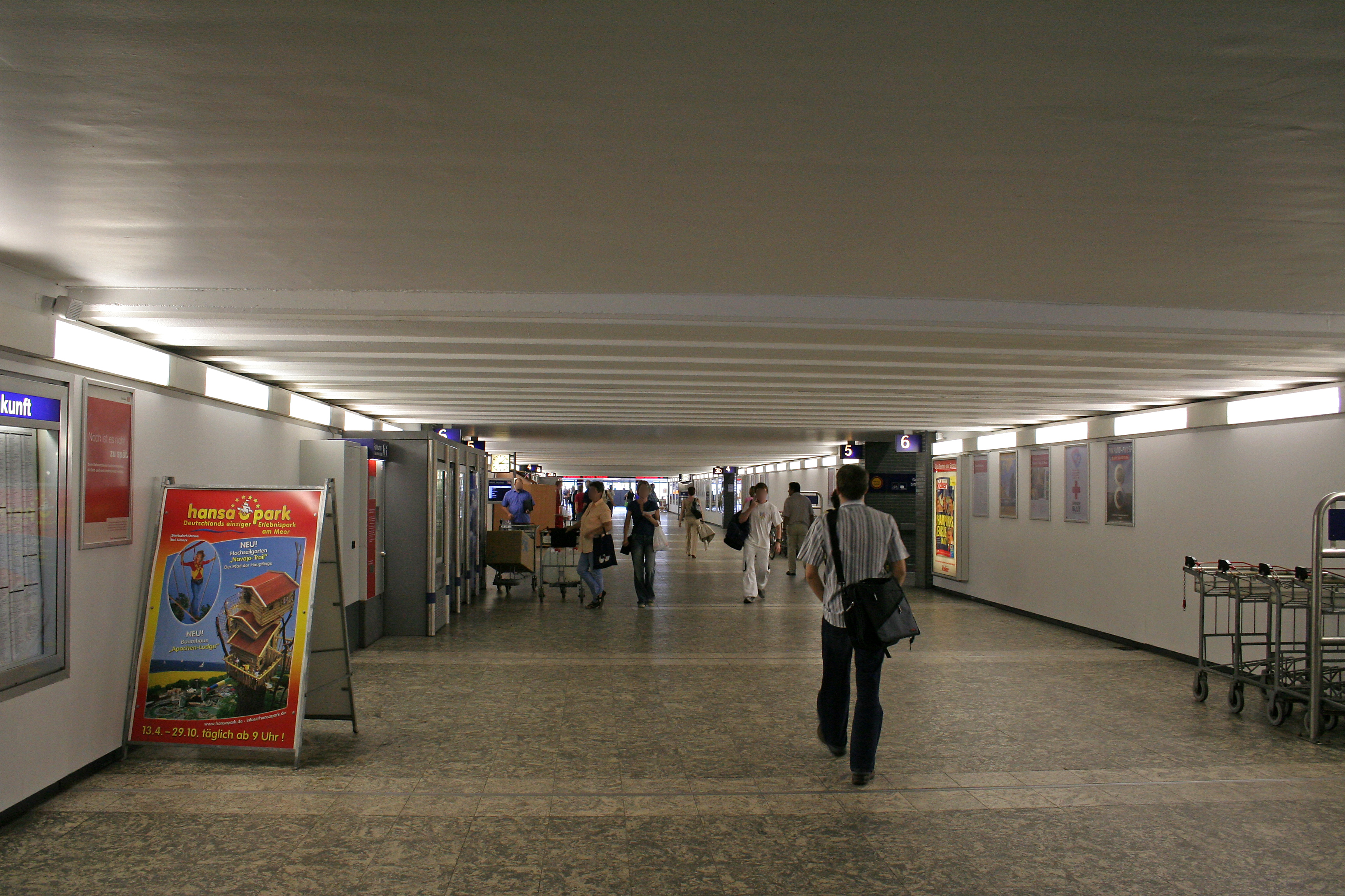 Podchod pod hlavním nádražím v Braunschweigu v Německu